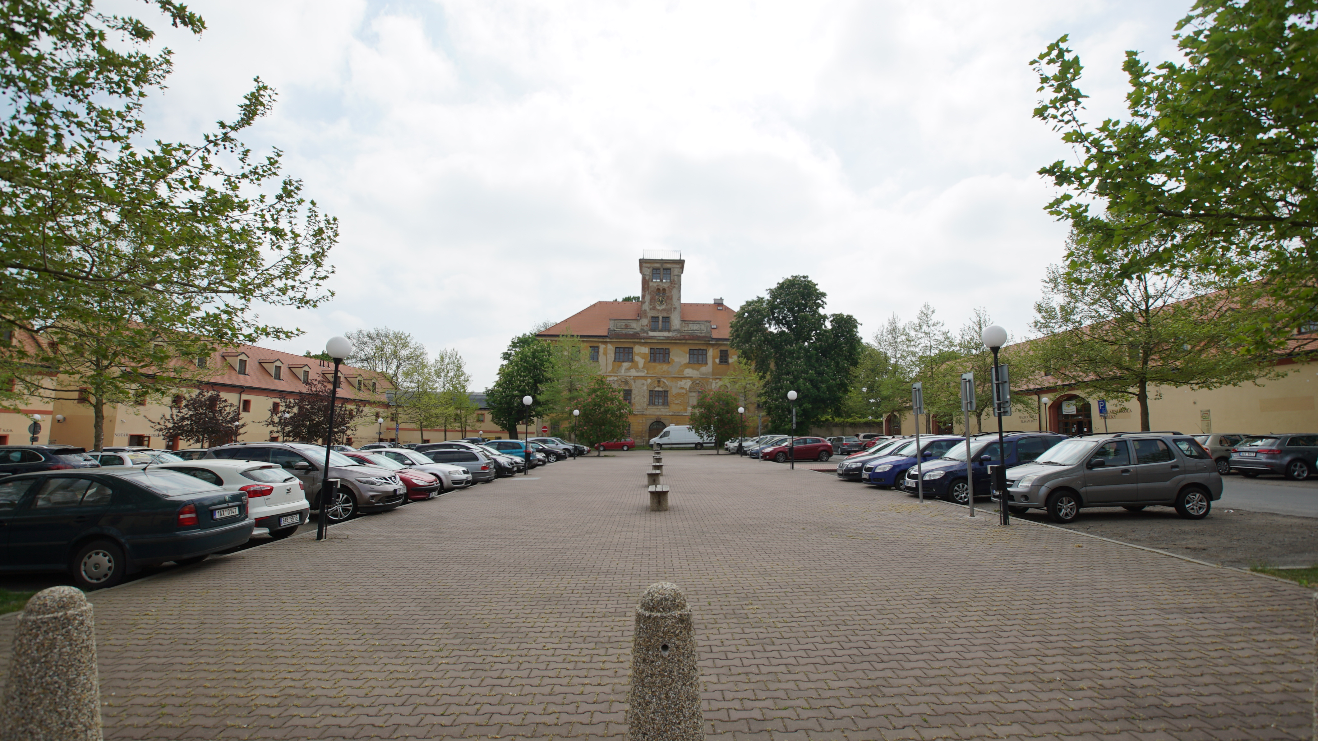 Vnitřní náměstí tvrze Kunratice se zámkem.